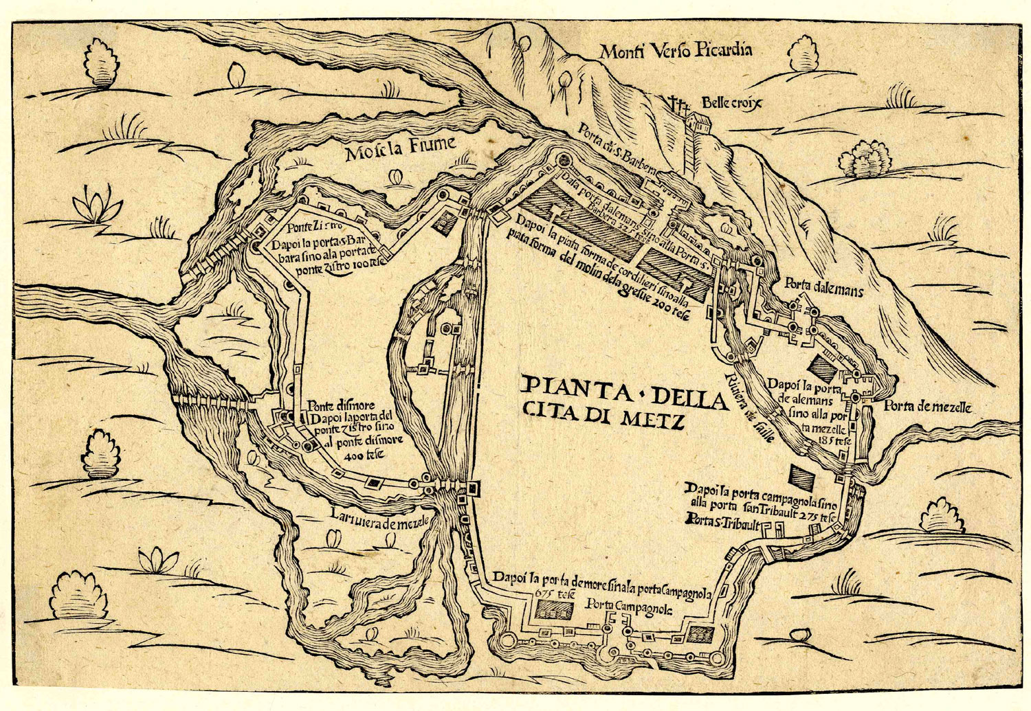 Ansicht von Metz; Holzschnitt, um 1540